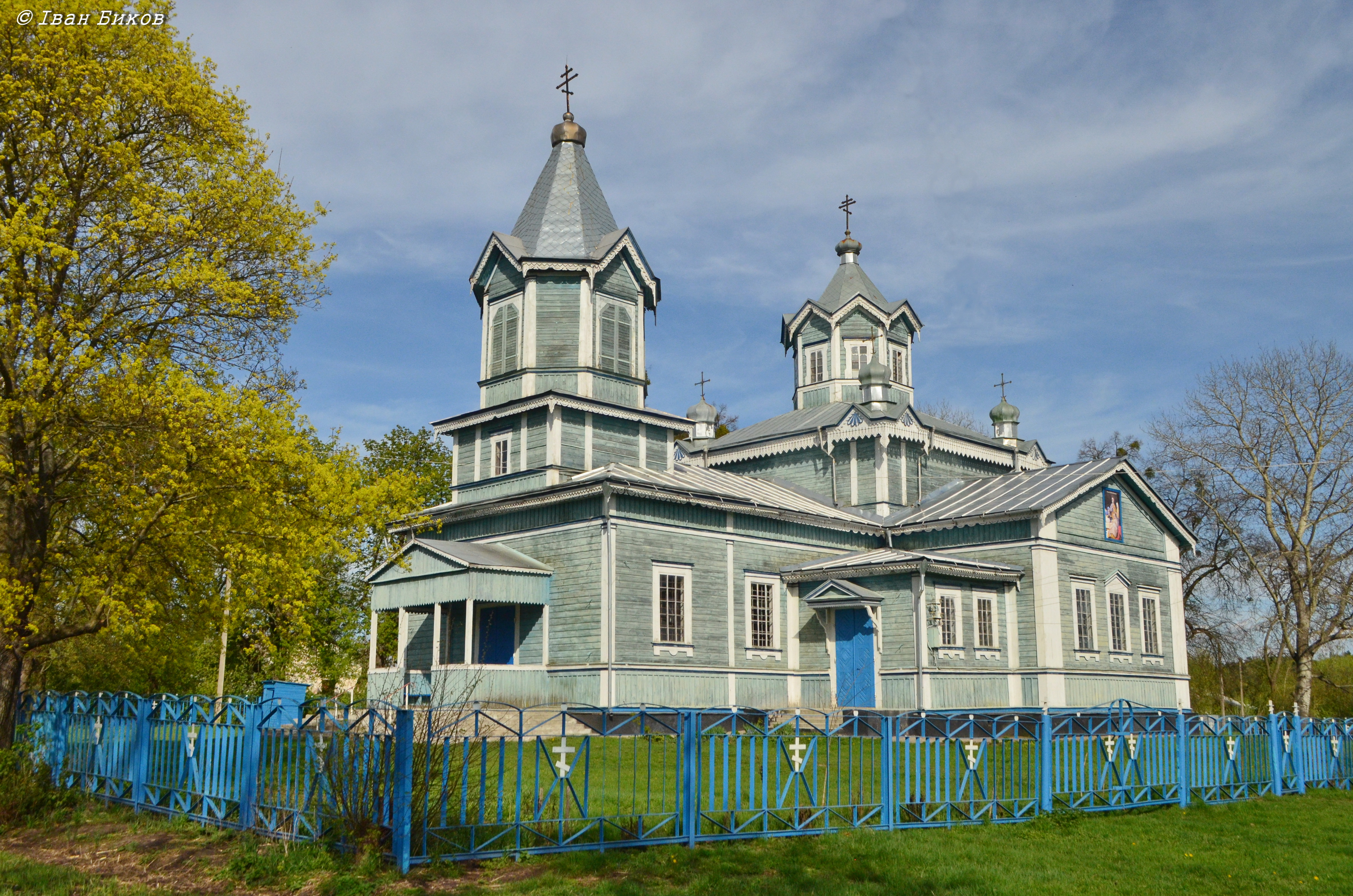 Церква Різдва Богородиці (дер.), село Березна